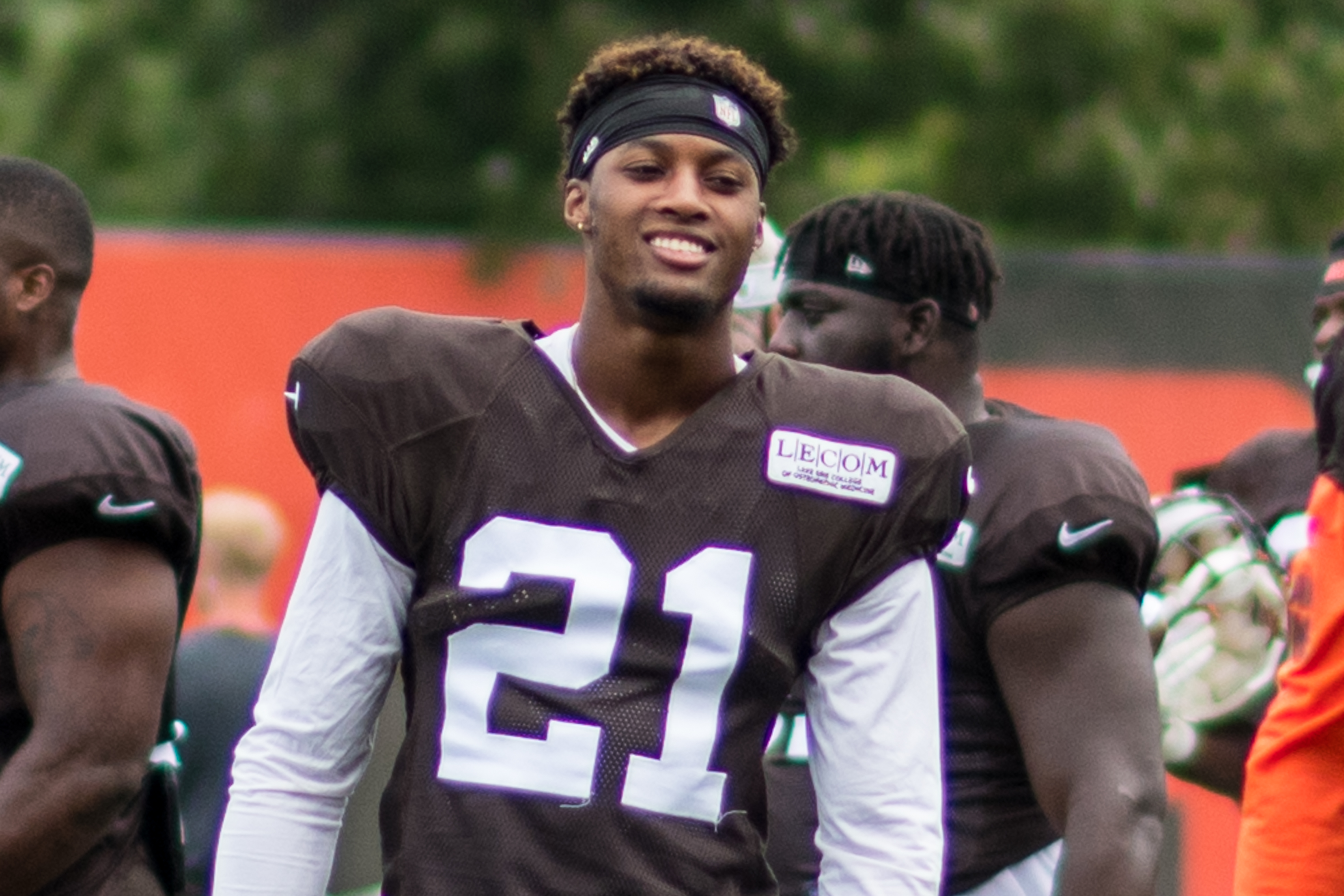 Denzel Ward